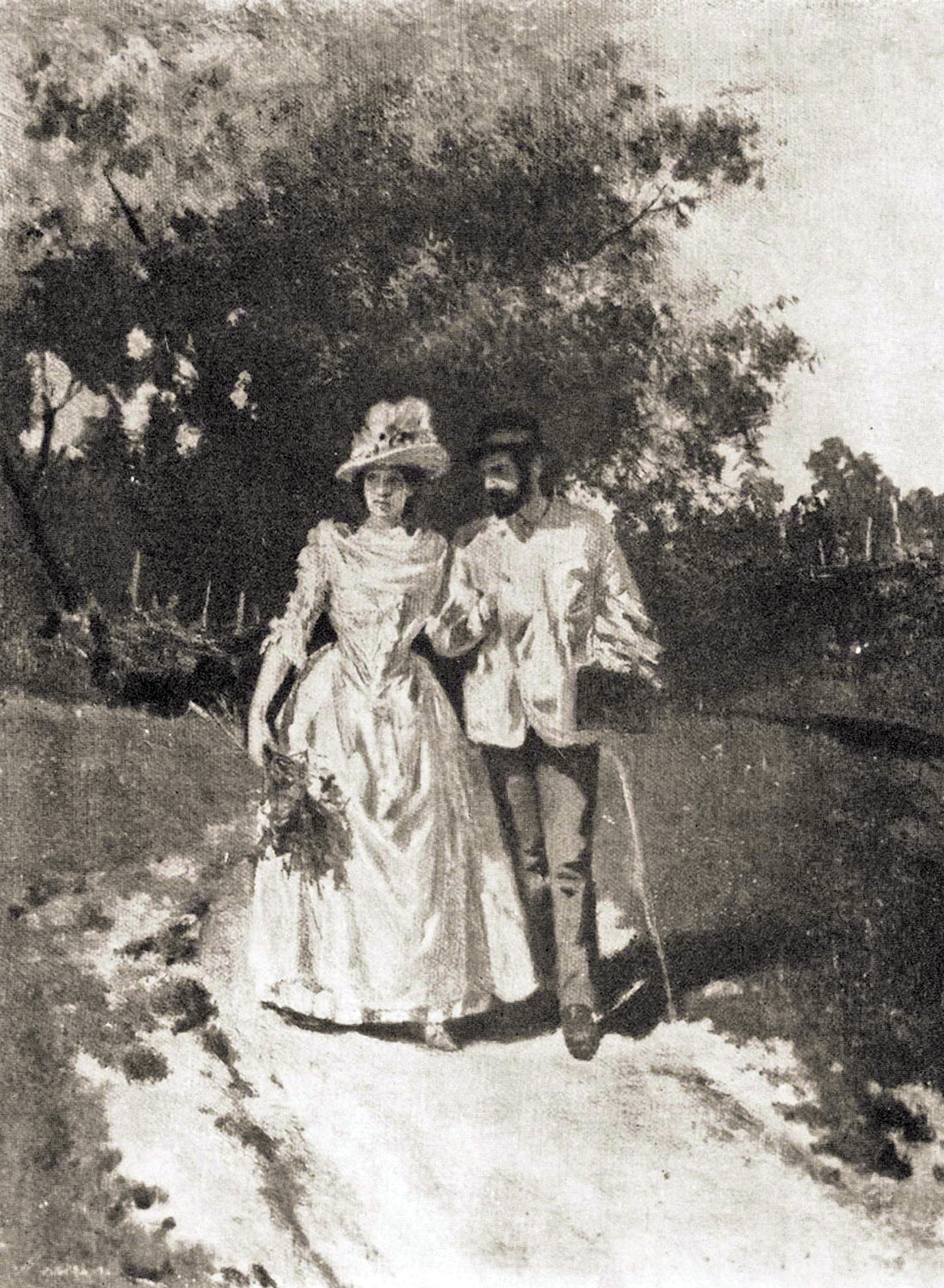 Левитан и Кувшинникова. Холст, масло. Художник А. С. Степанов.